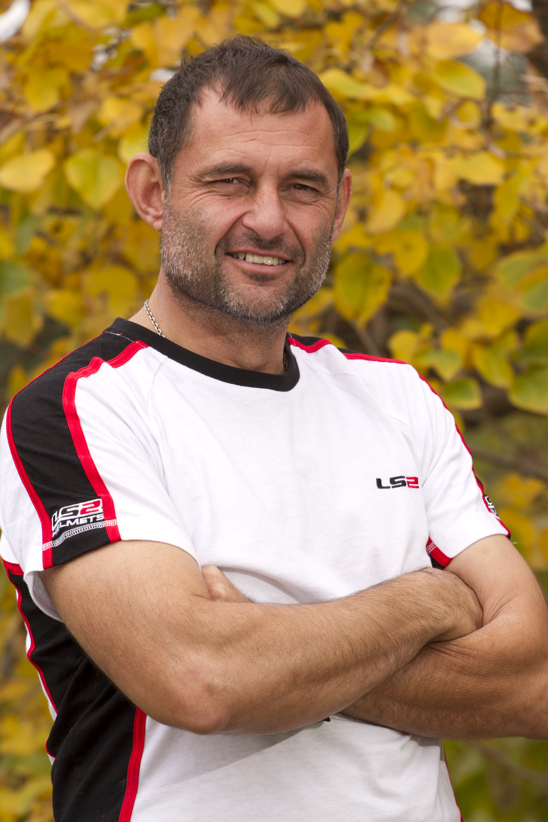 eugenio rosco favre